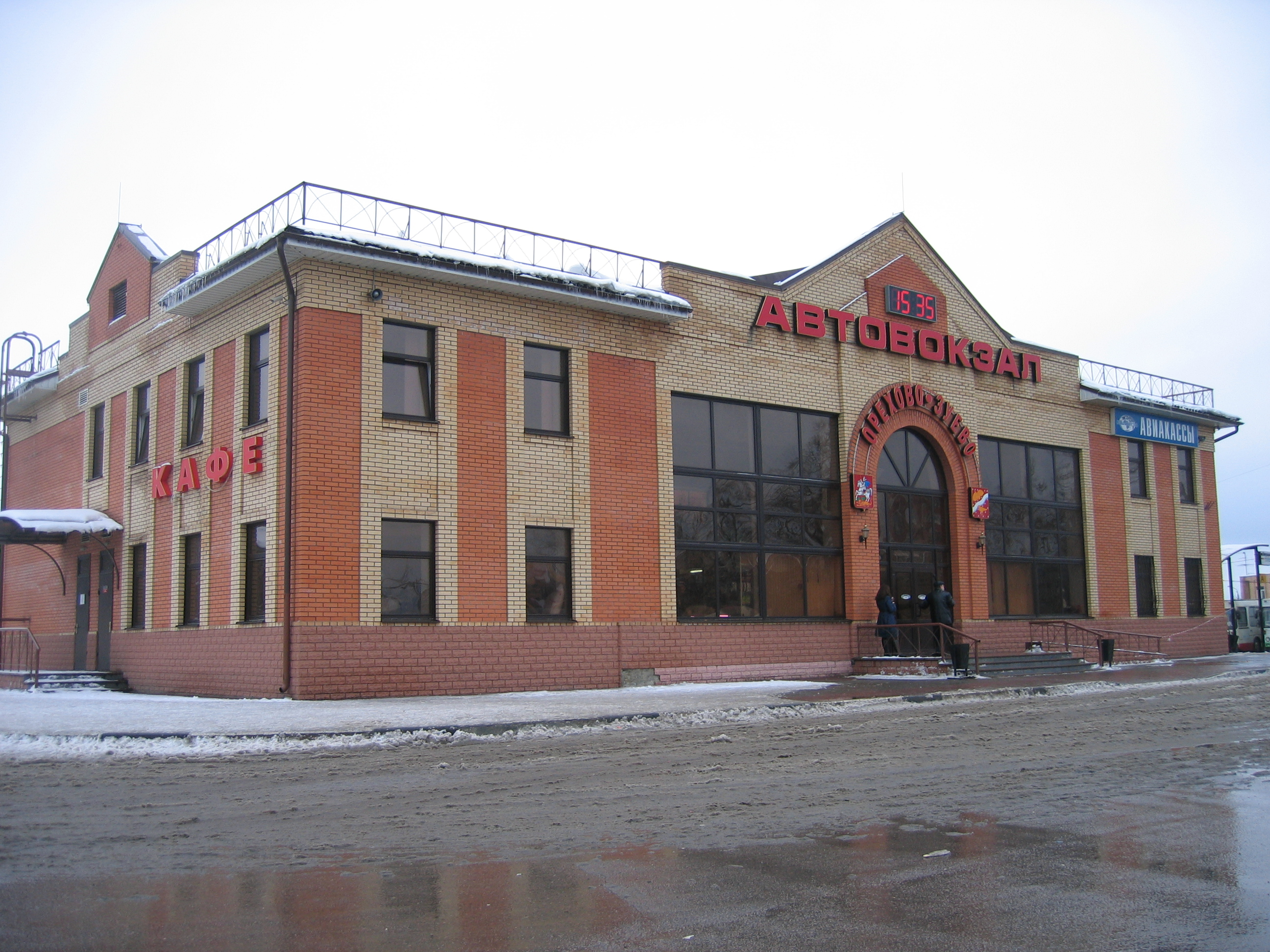 Busbahnhof in Orechowo-Sujewo, Russland